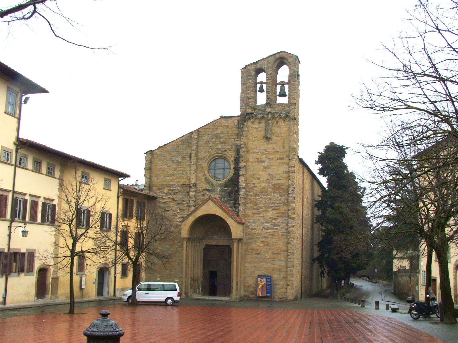 La chiesa di San Domenico ad Arezzo contenente il crocefisso di Cimabue.